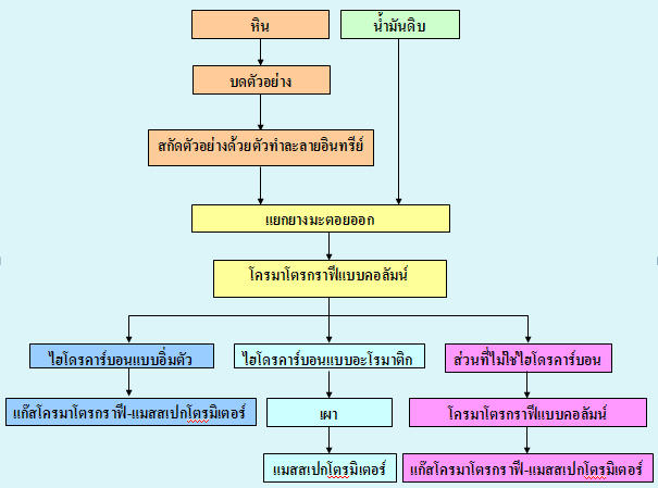 ขั้นตอนวิเคราะห์ไบโอมาร์คเกอร์